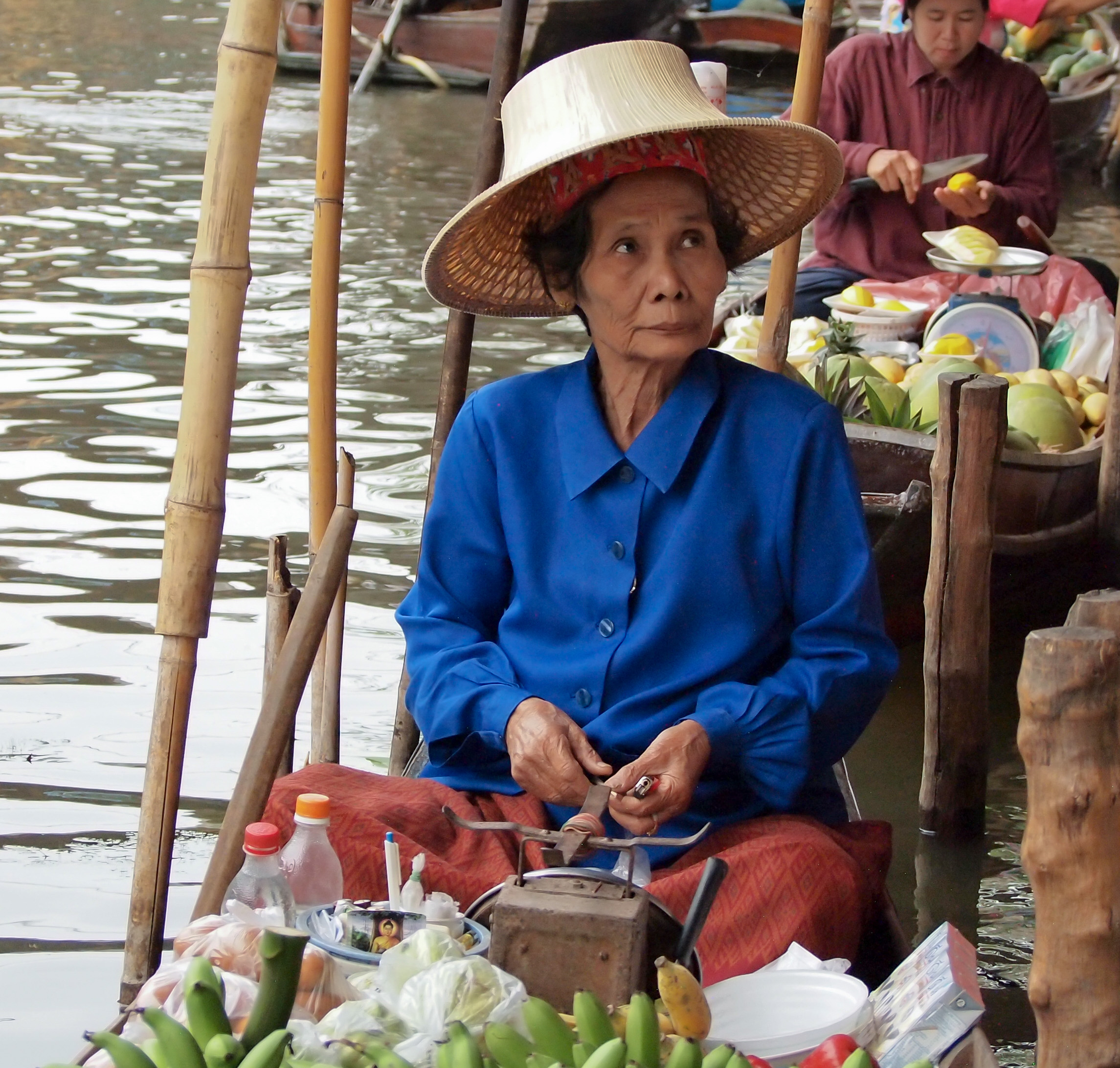 Woman in Blue, Floating Market, Bangkok